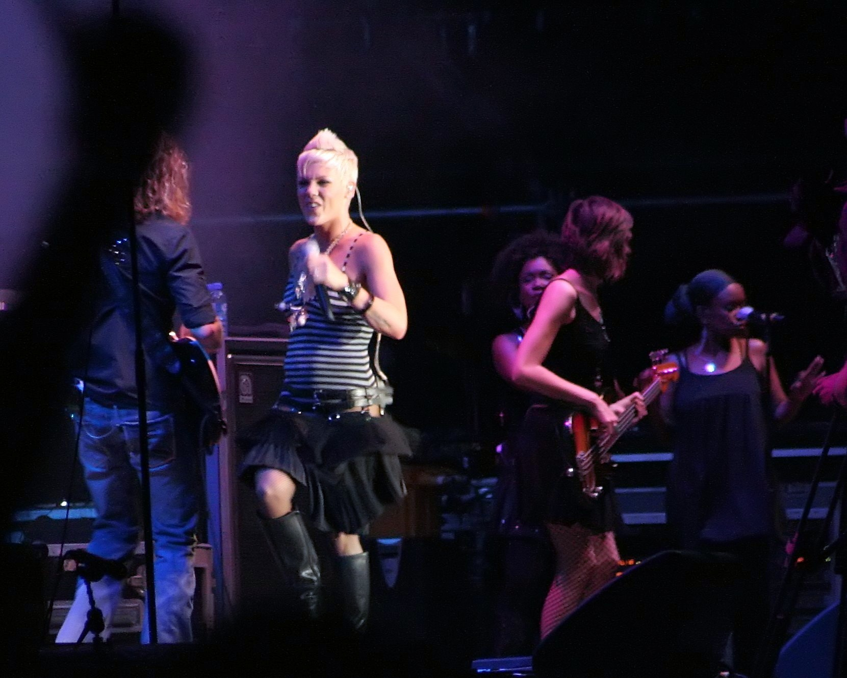 Pink bei der Arena of Pop 2007 im Mannheimer Schloss - Nr. 001 Pink at the "Arena Of Pop" 2007 on Mannheim Castle - No. 001